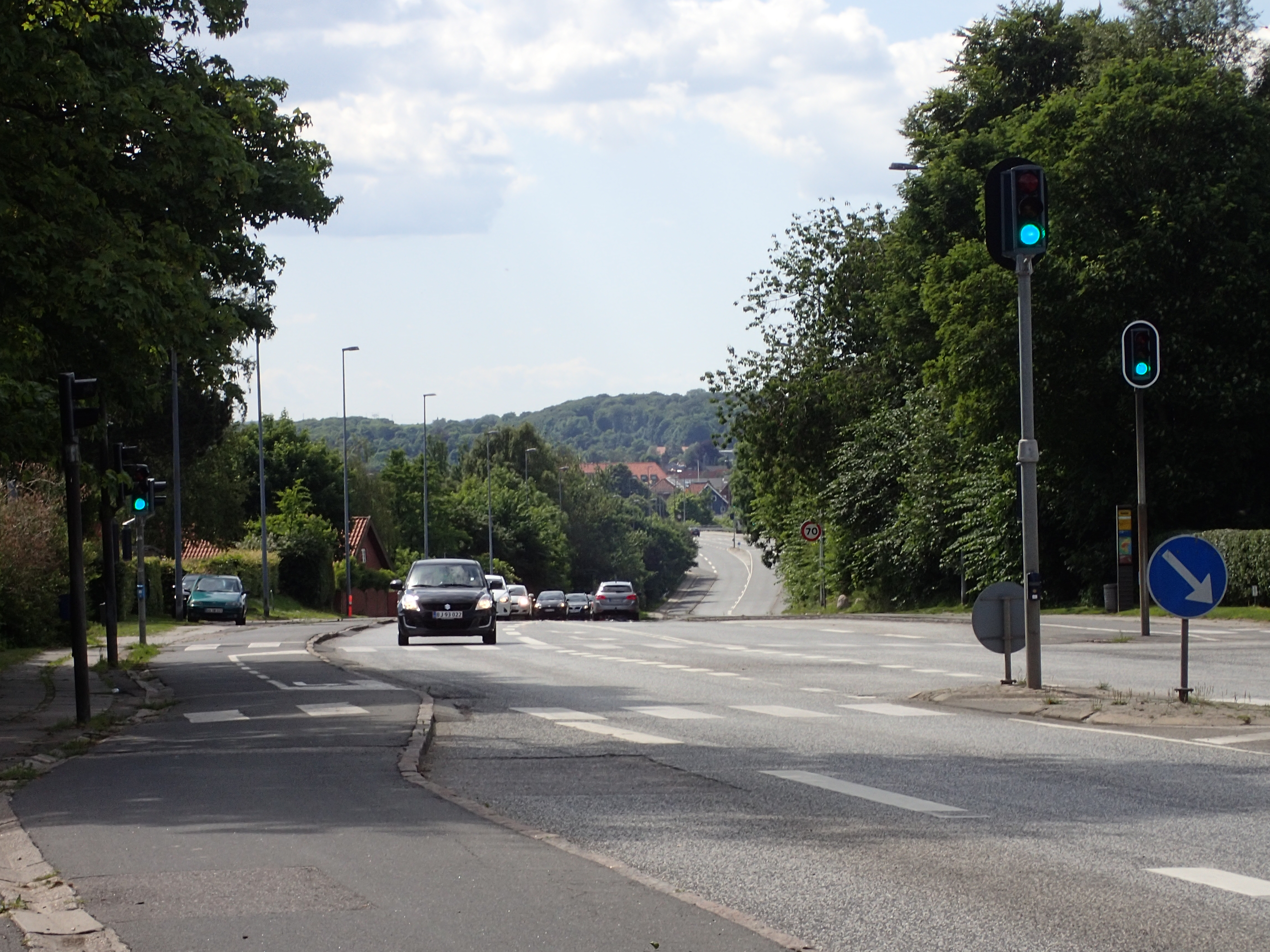 Silkeborgvej i Brabrand.